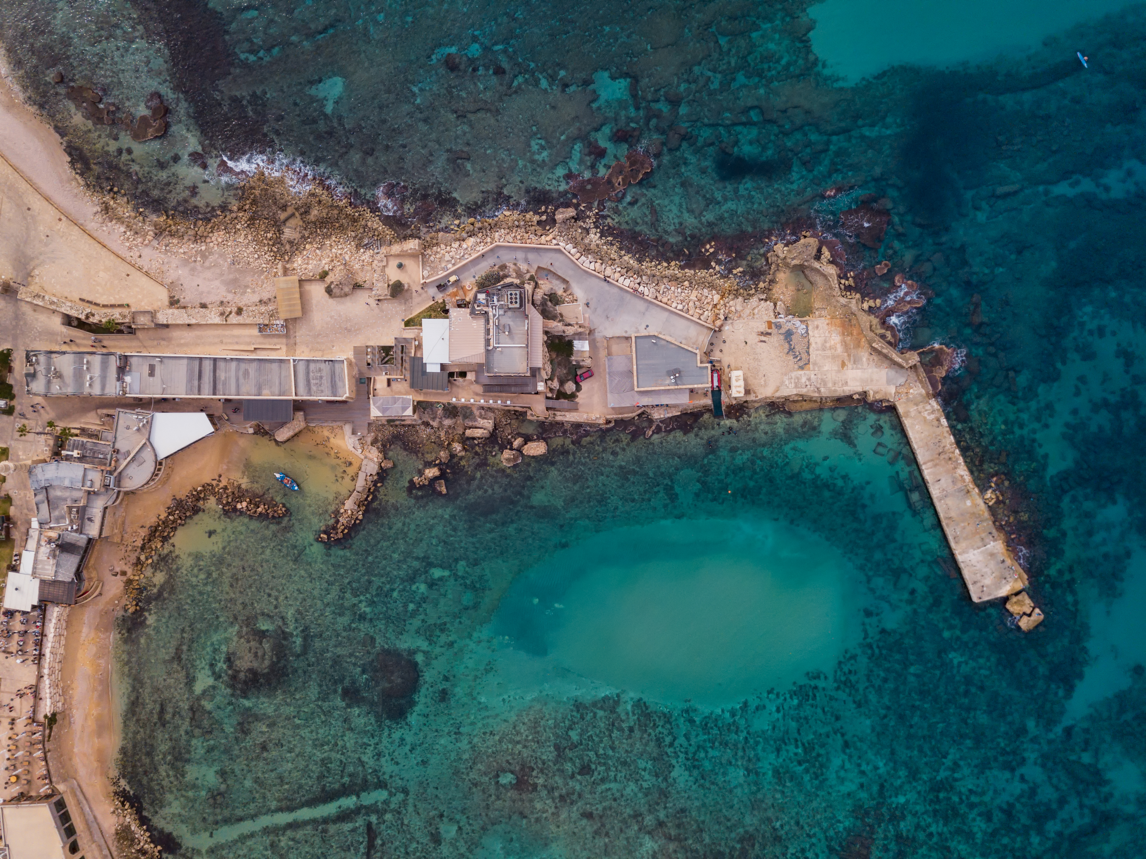 הנמל העתיק שהוקם לפני כ-2,000 שנה על ידי המלך הורדוס. ניתן למצוא בו עוגנים עתיקים, שרידים ועמודי שיש שונים.